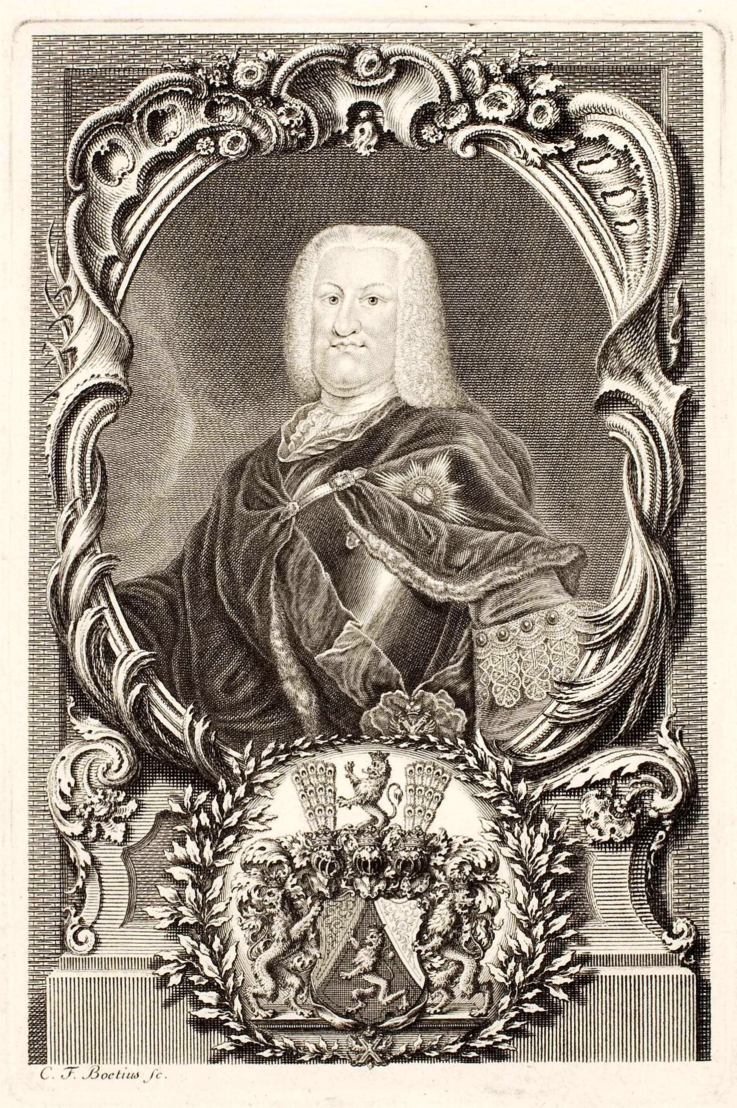 Porträt des Grafen Johann Christian von Hennicke. (1681–1752; 1728 in den Reichsadelsstand erhoben, 1741 in den Freiherrenstand, 1745 in den Reichsgrafenstand; Erb-, Lehn- und Gerichtsherr auf Wiederau, Rüssen, Döhlen, Groß-Storkwitz, Maschwitz und Klein-Dalzig; Ritter des Russischen St.- Andreas-Ordens; Königlich-Polnischer und Kurfürstlich-Sächsischer Staats- und geheimer Konferenz-Minister; Wirklicher Geheimer Rat, Vize-Kammer- und Berg-Präsident; Kammer-Direktor der Stifte Naumburg und Merseburg)